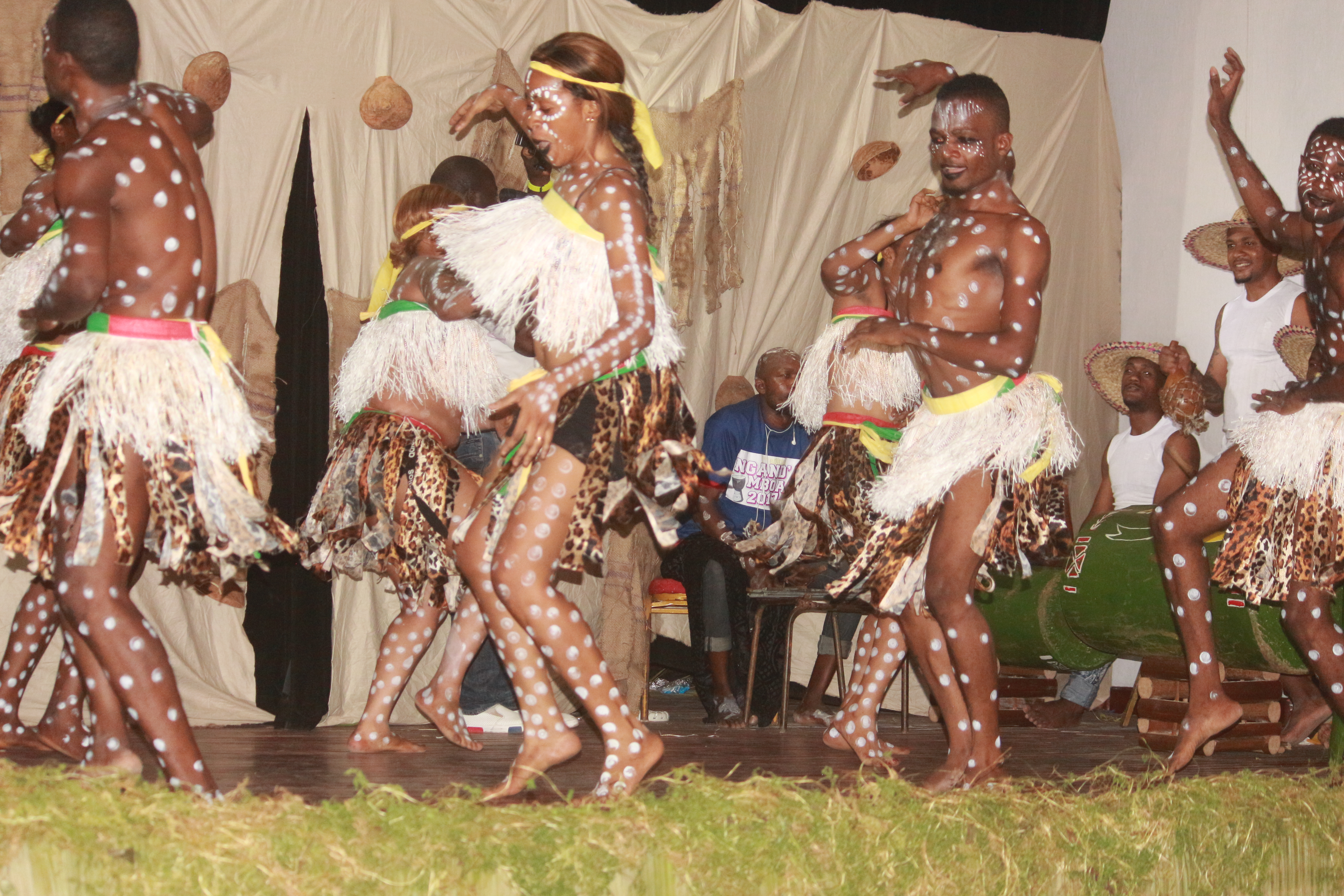 Lors de la première édition du festival de danse Ngand'a Mboa organisé à Douala This is an image of music and dance from Cameroon